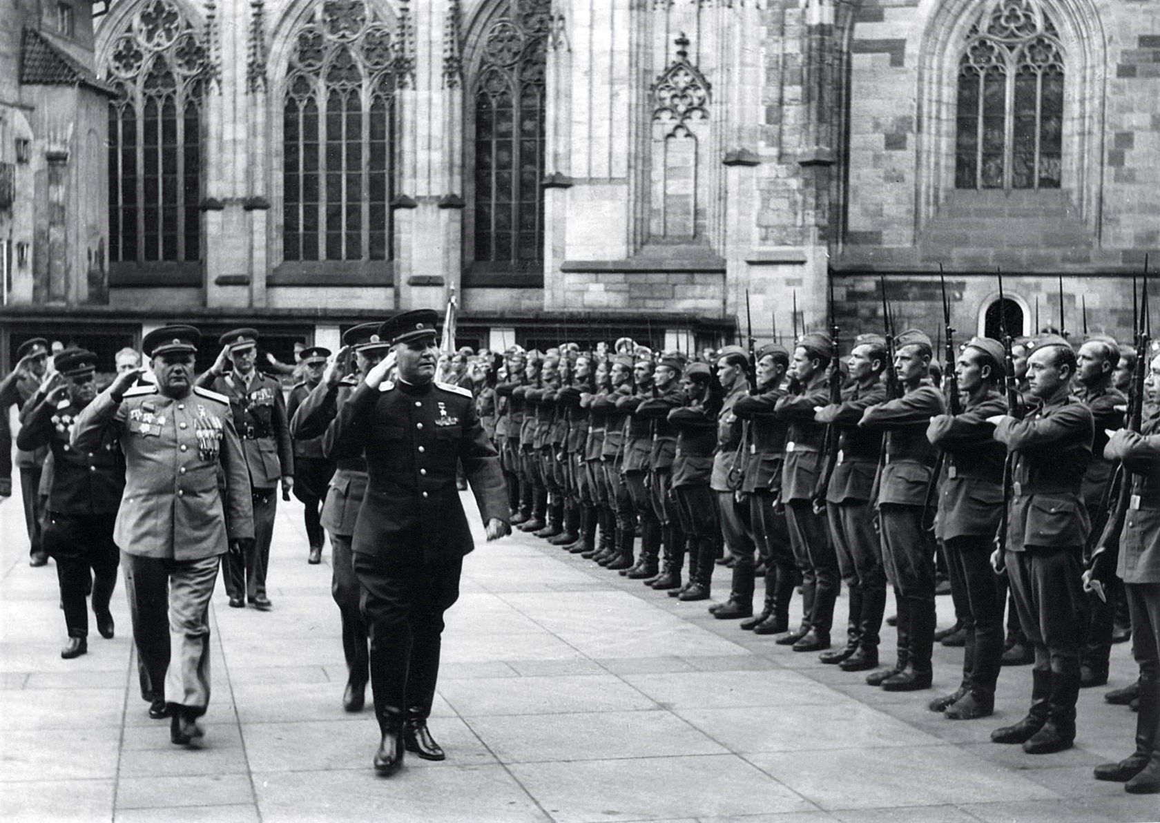 Прага. Пражский Град. Маршал Советского Союза И.С. Конев и генерал армии А.И. Ерёменко на церемонии вручения чехословацкого ордена Белого льва. В почётном карауле солдаты чехословацкой армии